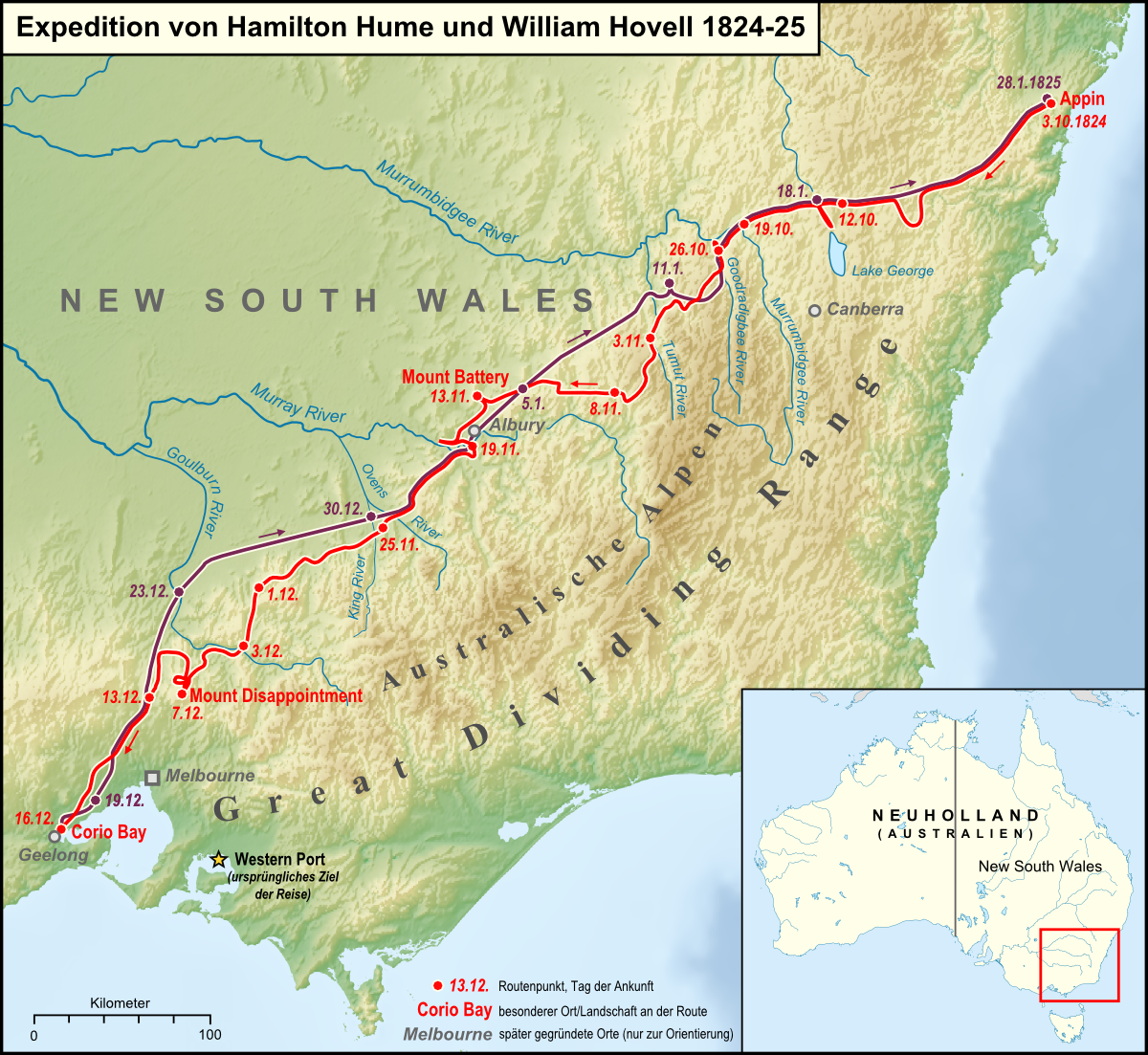 Karte der Hinreise der Expedition von Hamilton Hume und William Hovell 1824